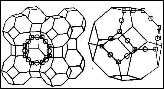 strukturní uspořádání molekul různých zeolitů Zdroj